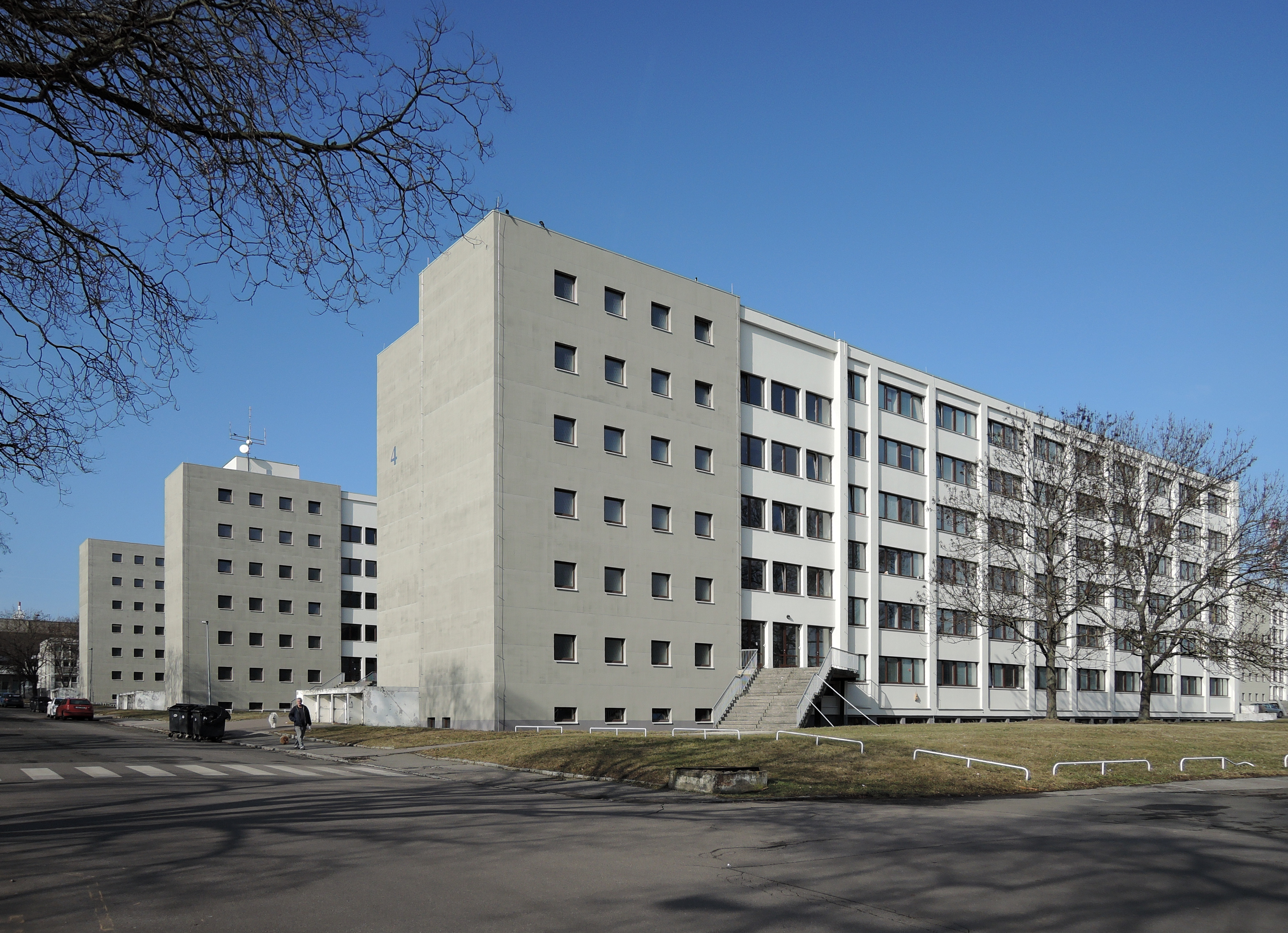 Praha, Břevnov, ulice Jezdecká, koleje Strahov po renovaci